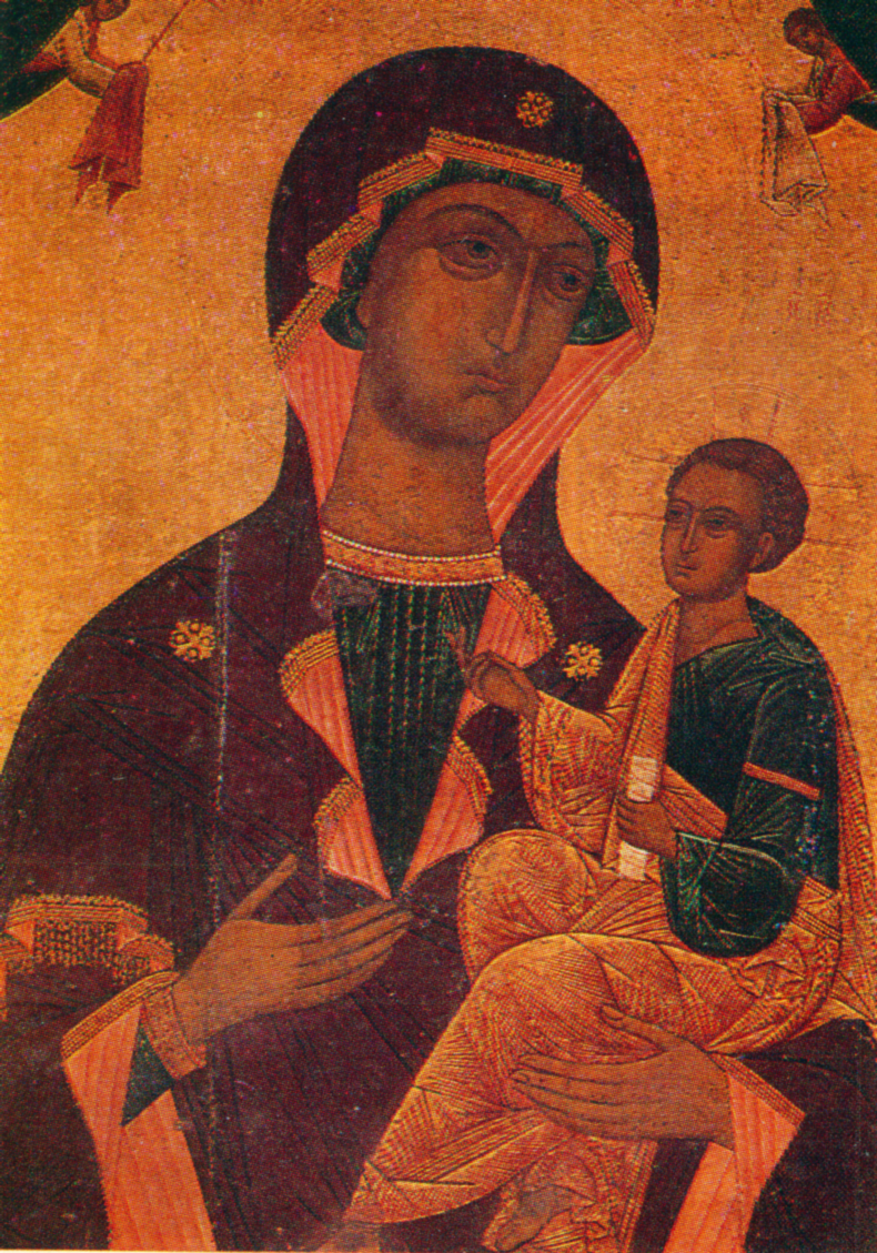 Икона Божией Матери Одигитрии Иерусалимской